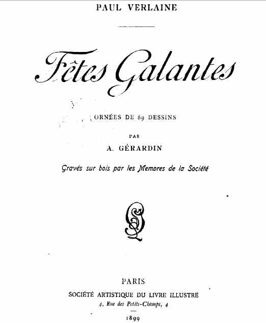 Fêtes Galantes